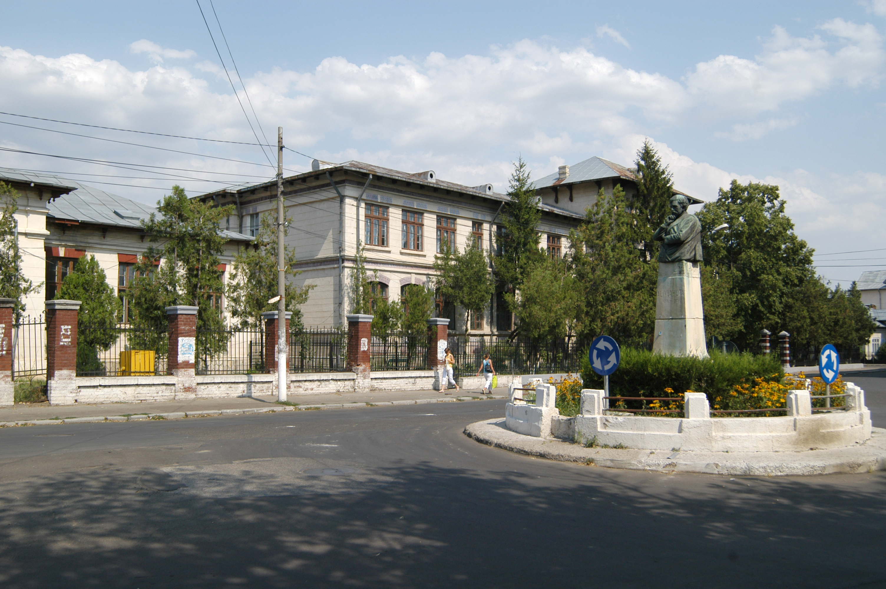 The Alexandru Vlahuţă School in Râmnicu Sărat, Romania